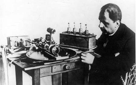 Ованес Абгарович Адамян